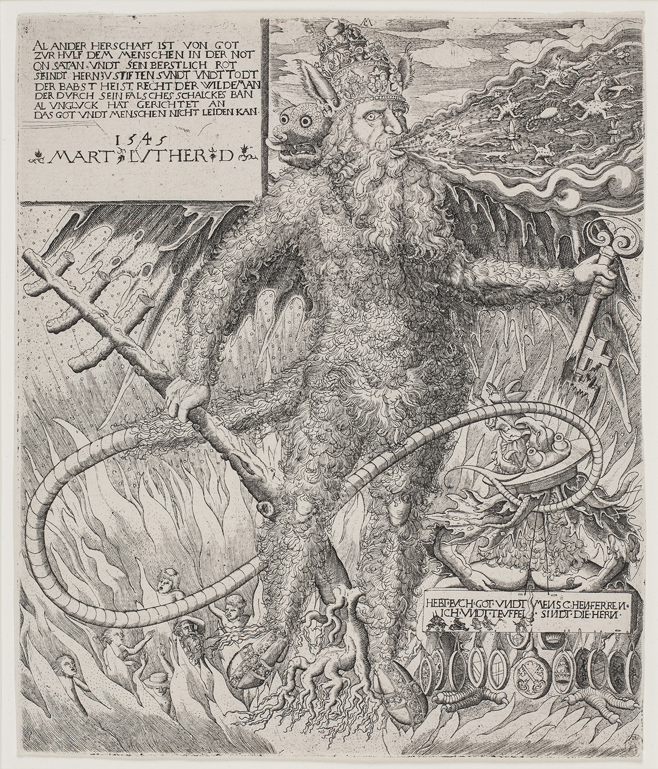 Melchior Lorck (1527-1626), Paven som vildmand. Spottebillede, 1545